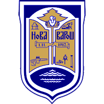 Грб општине Нова Варош